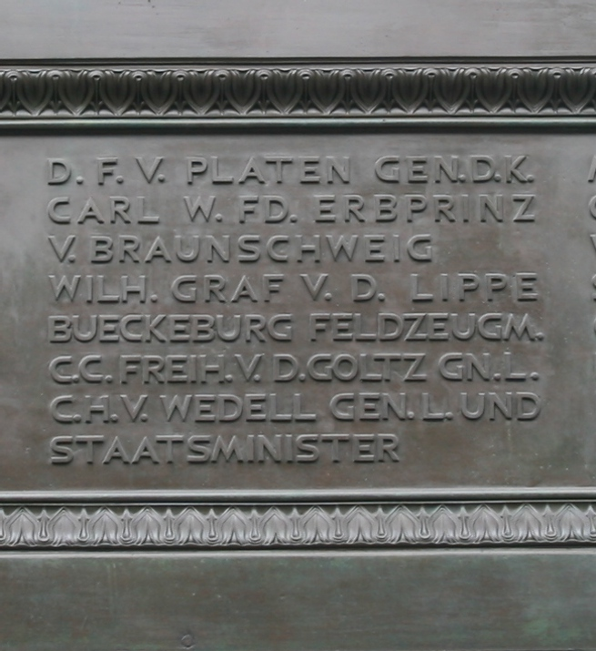 Reiterstandbild - Friedrich der Große - Südansicht ( Details ) unten - Namenstafel - mittig D.F. V. PLATEN GEN.D.K. ------- Dubislaw von Platen CARL W.FD.ERBPRINZ V. BRAUNSCHWEIG ------- Karl Wilhelm Ferdinand (Braunschweig-Wolfenbüttel) WILH. GRAF V. D. LIPPE BUECKEBURG FELDZEUGM. --- Wilhelm (Schaumburg-Lippe) C.C. FREIH. V. D. GOLTZ GN.L. -------- Karl Christoph von der Goltz C.H. V. WEDELL GEN.L. UND STAATSMINISTER ----- Carl Heinrich von Wedel Quelle der Links : wiki Berlin - Unter den Linden ( Mittelpromenade ) Baudenkmal ( LDA ) Landesdenkmalamt - Berlin Dok Nr. 09060118 LDA Info wiki Reiterstandbild Friedrichs des Großen